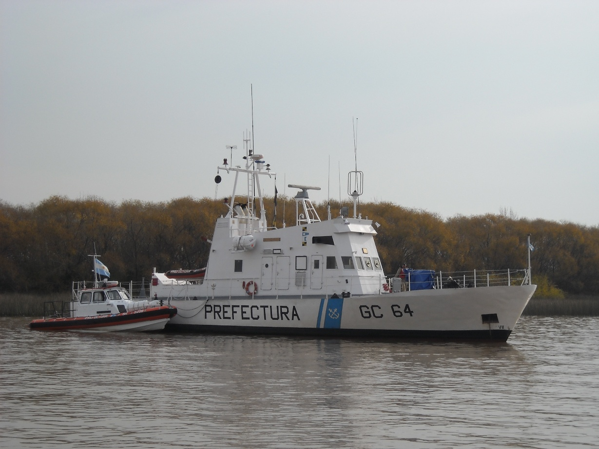 GC-64 - Mar del Plata en el Delta del río Paraná, Tigre, Provincia de Buenos Aires.